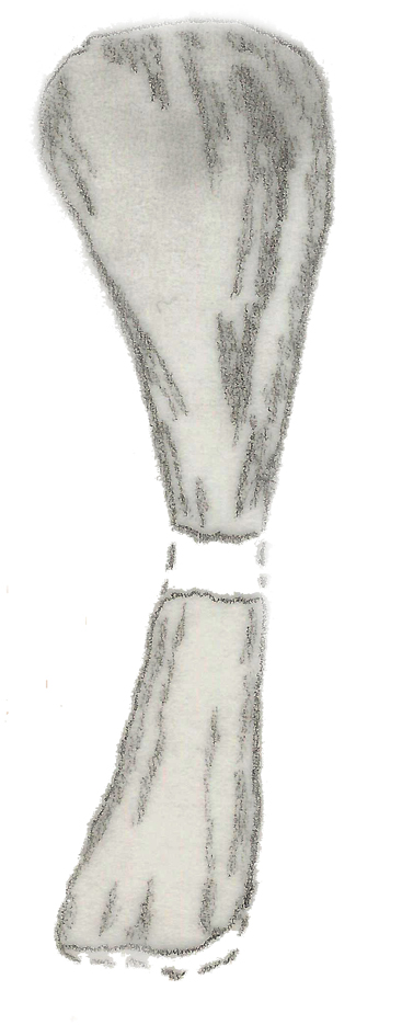 Illustration of a fossil of Dinodocus